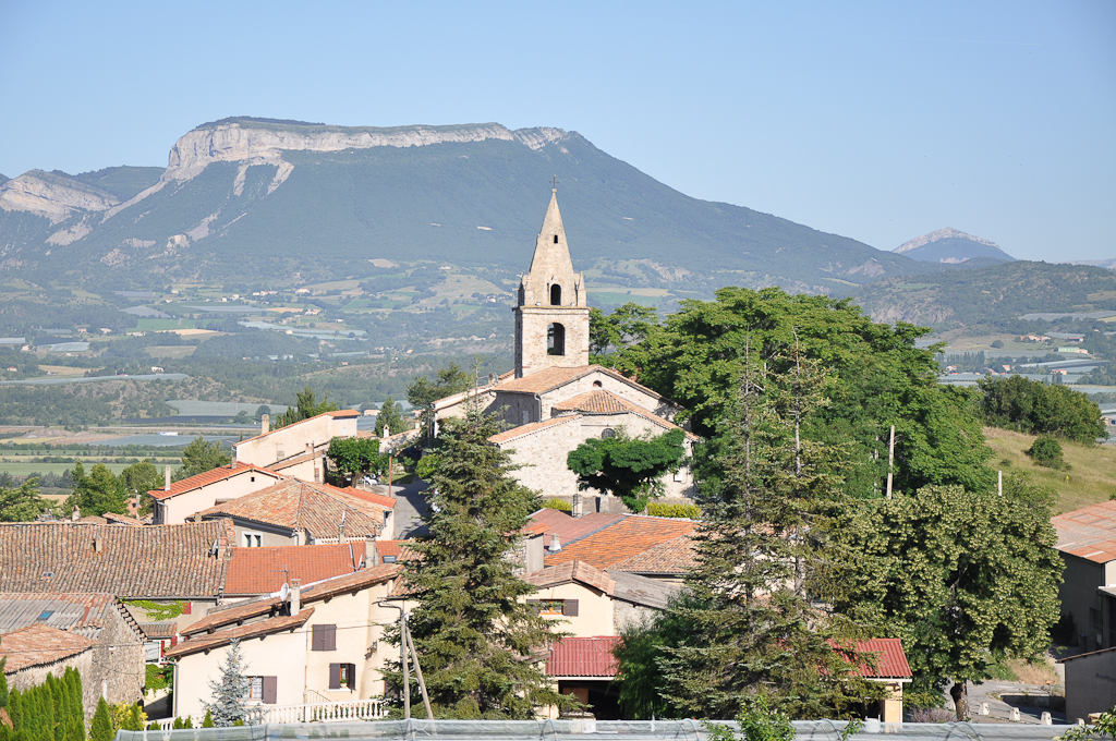 Claret, le village